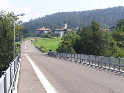 Amblar (Trentino)